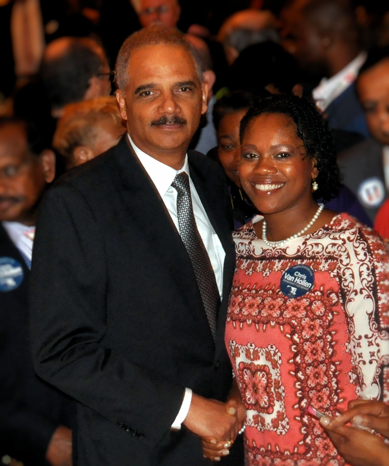 Former US Attorney General Eric Holder.